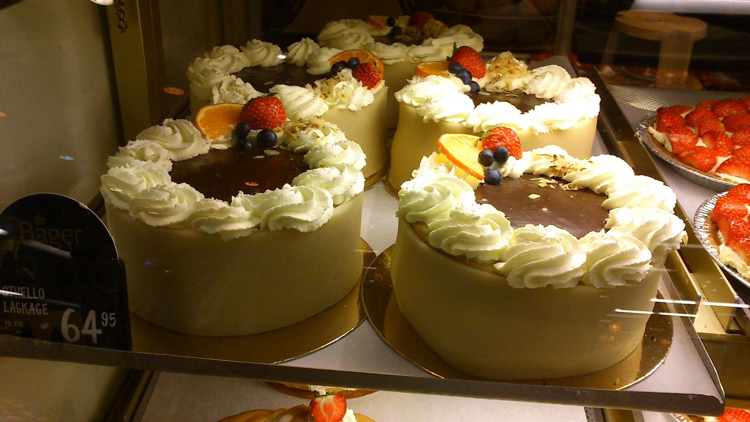 Othello lagkager. Bageren i Viby Center, Aarhus.